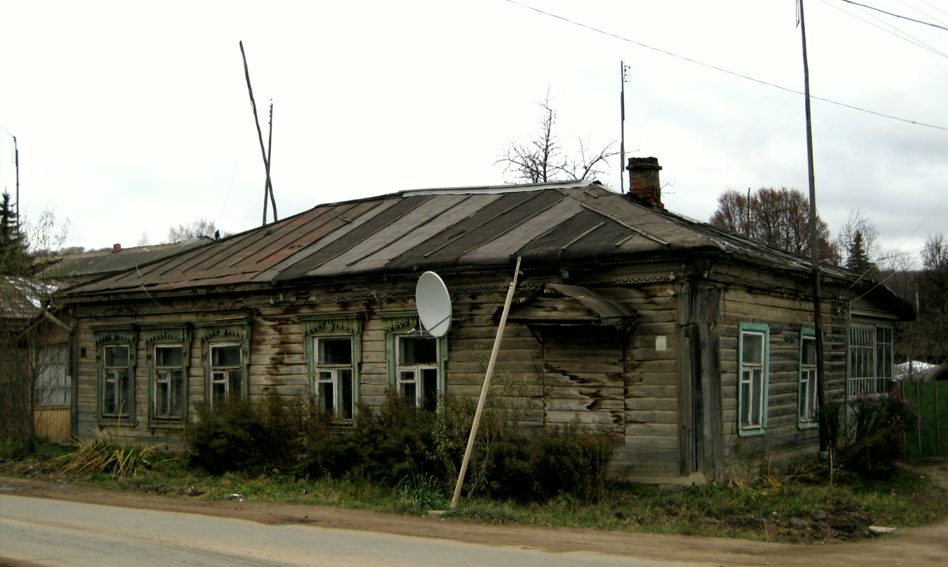 Дом в Тарусе